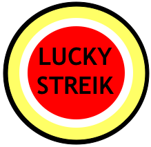 LUCKY STREIK: Nachgezeichnetes Streiklogo des Studentenstreiks 1997/98. Selbst hergestellt.